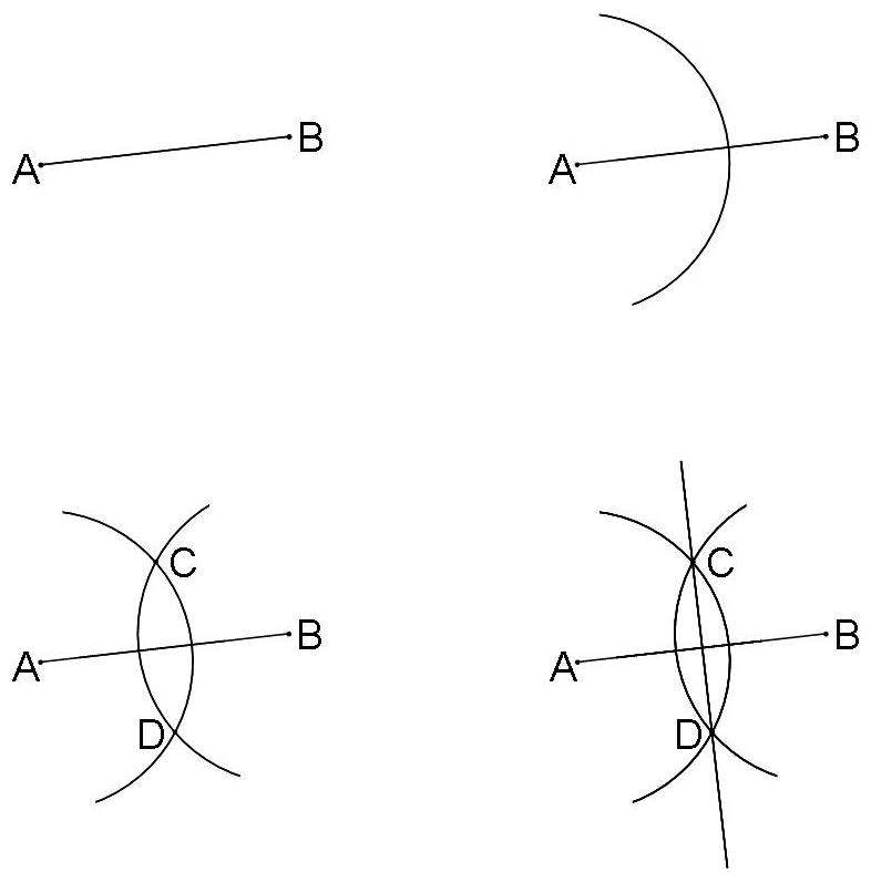 Passer en lineaalconstructie van een middelloodlijn.